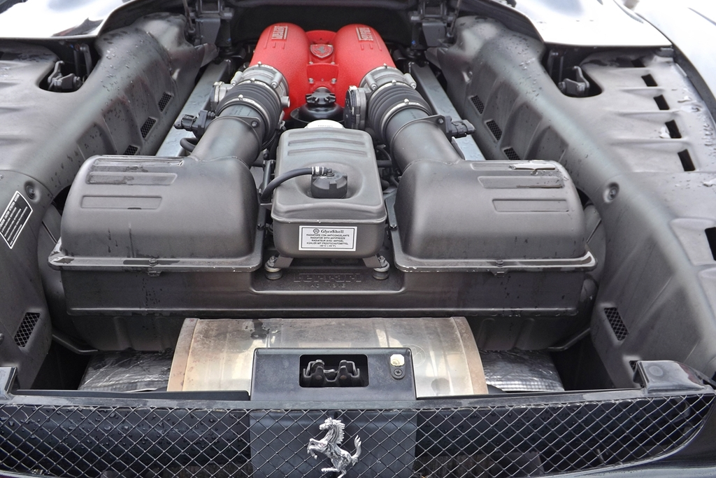 Ferrari Engine